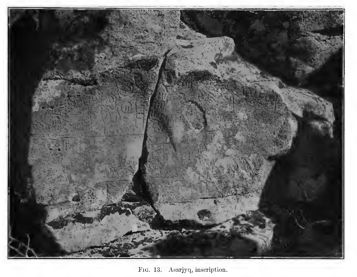 Luwische Felsinschrift von Hisarçık, Türkei, von einem Mitglied der Cornell-Expedition von 1907